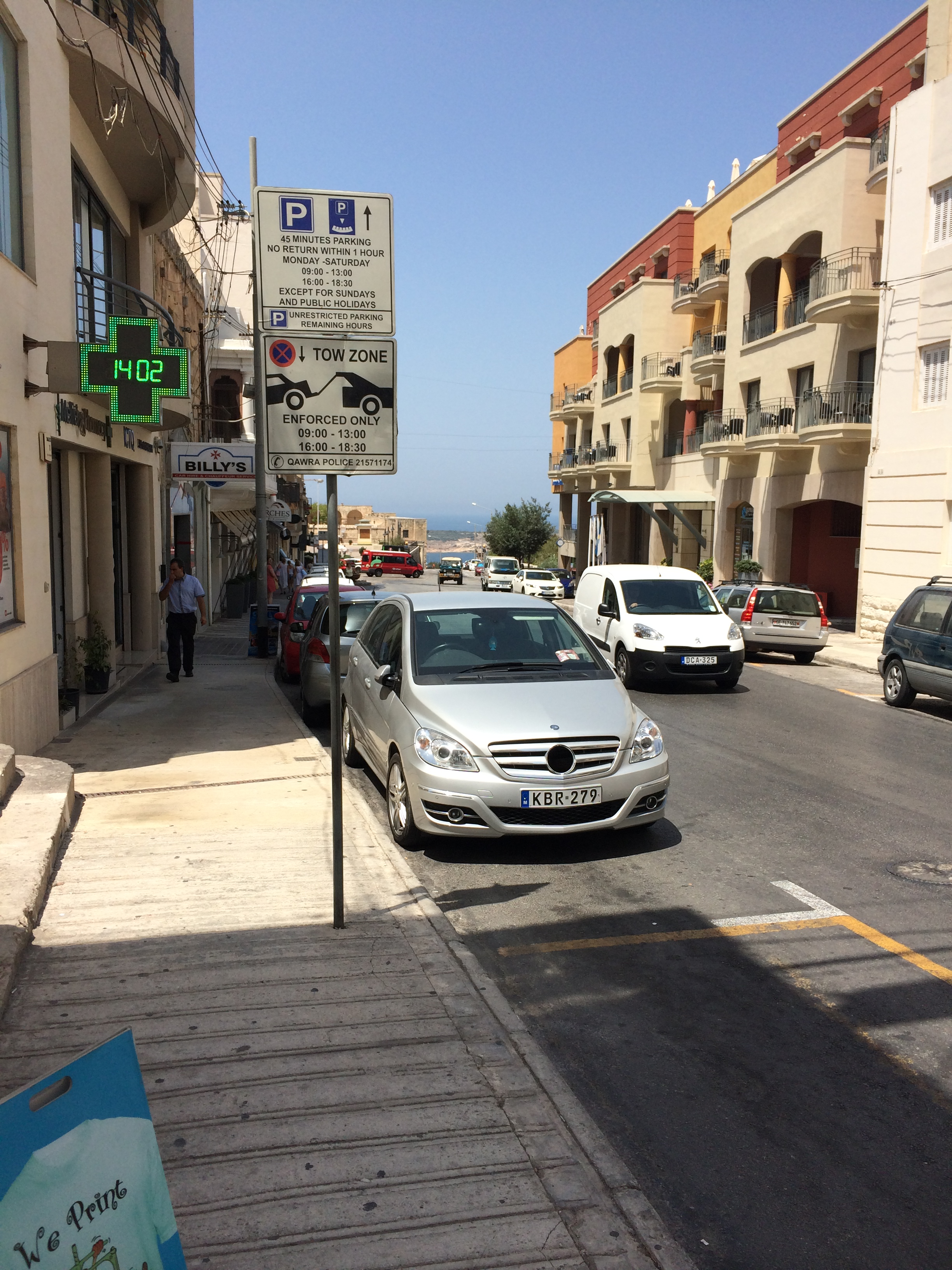 Hovedgata i Mellieha.